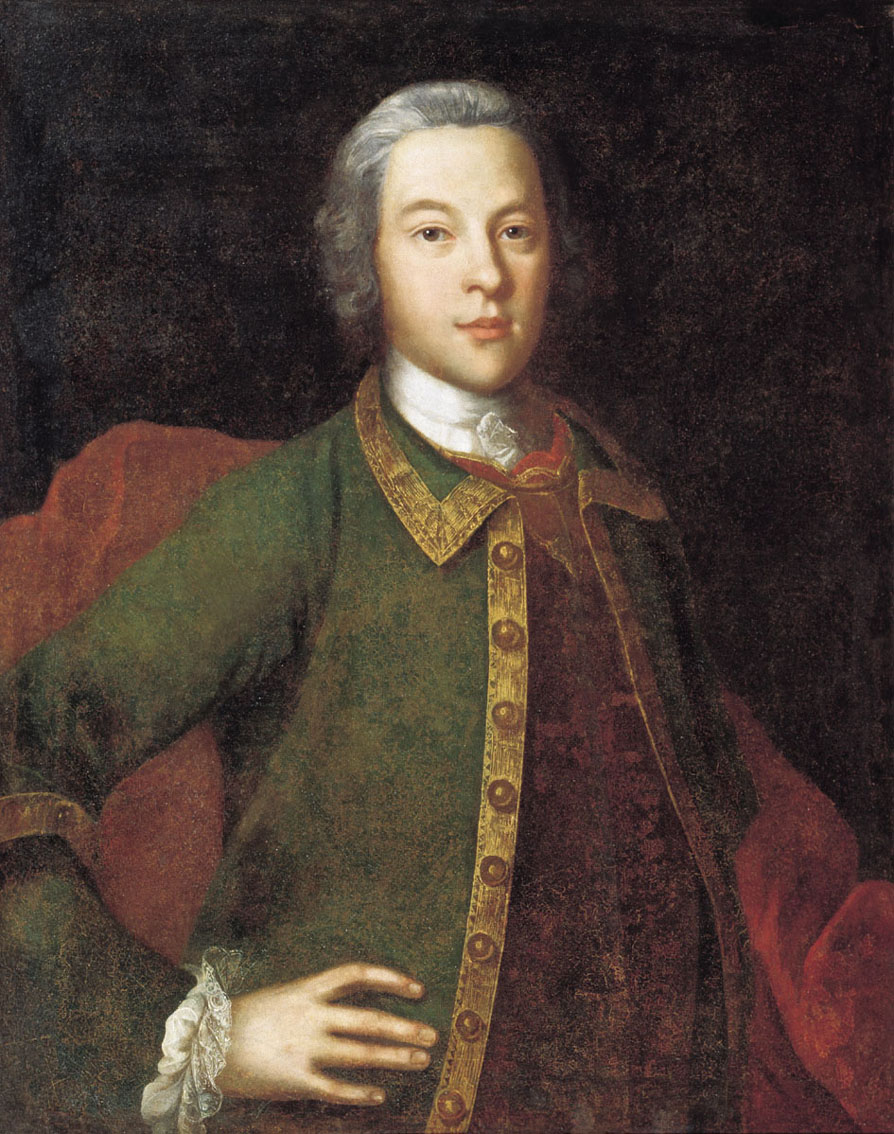 ВИШНЯКОВ Иван Яковлевич Портрет П.И. Панина 1742